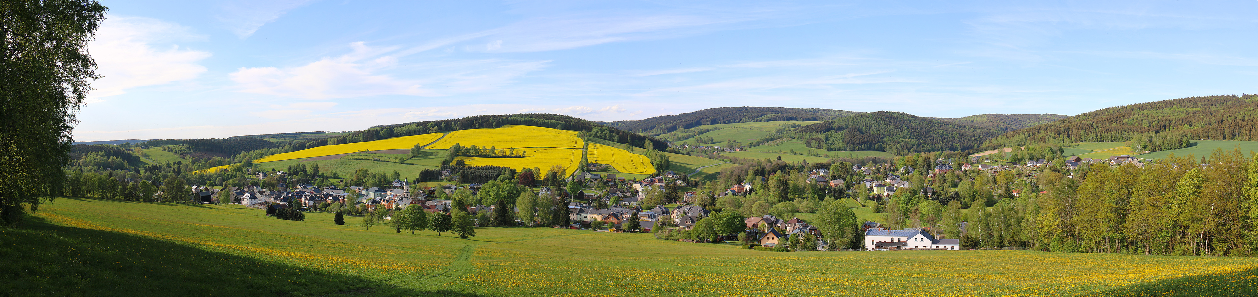 Panoramablick auf Erlbach/Vogtland Mai 2015 by erlbacher1